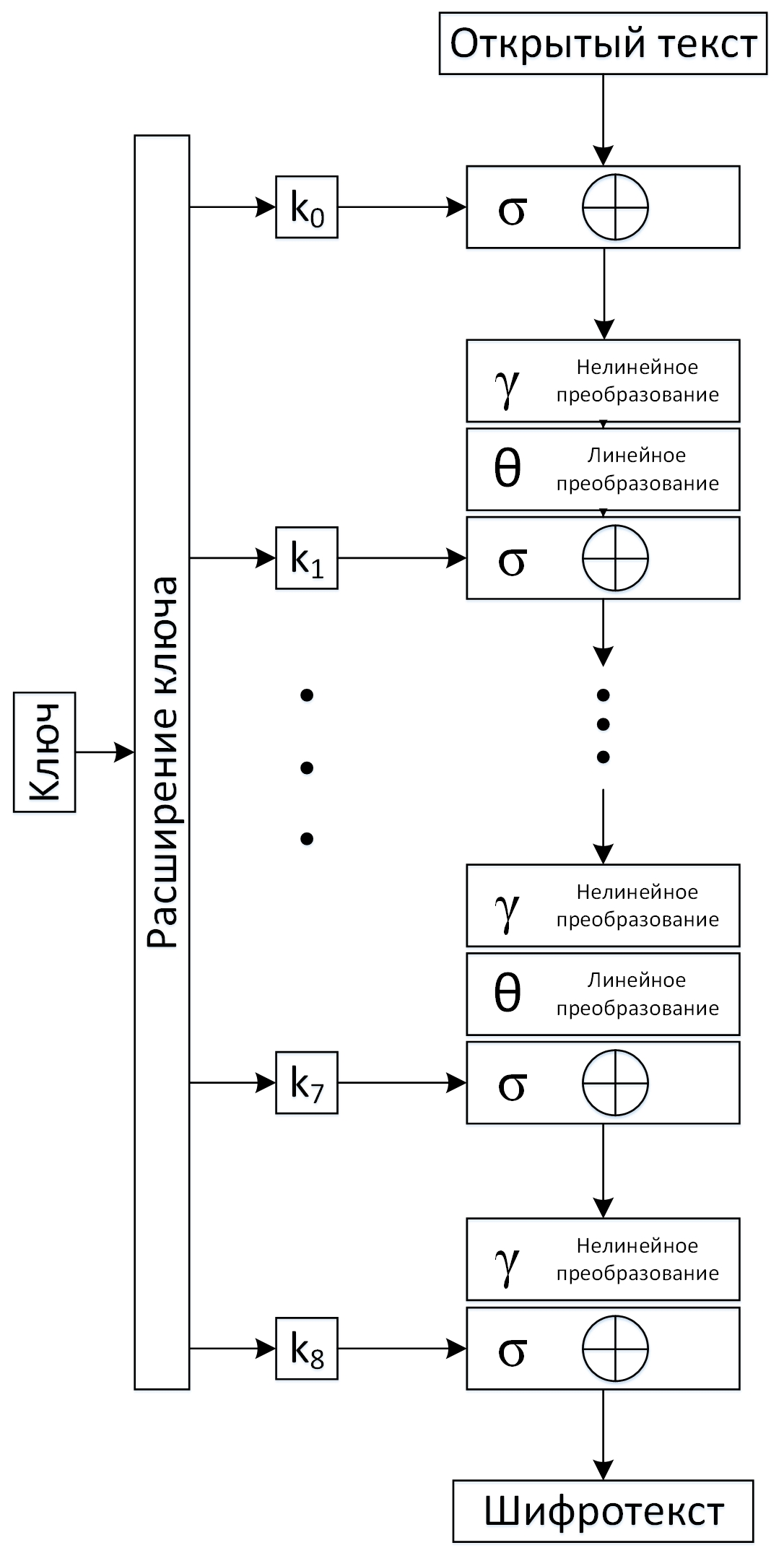 Структура алгоритма шифрования